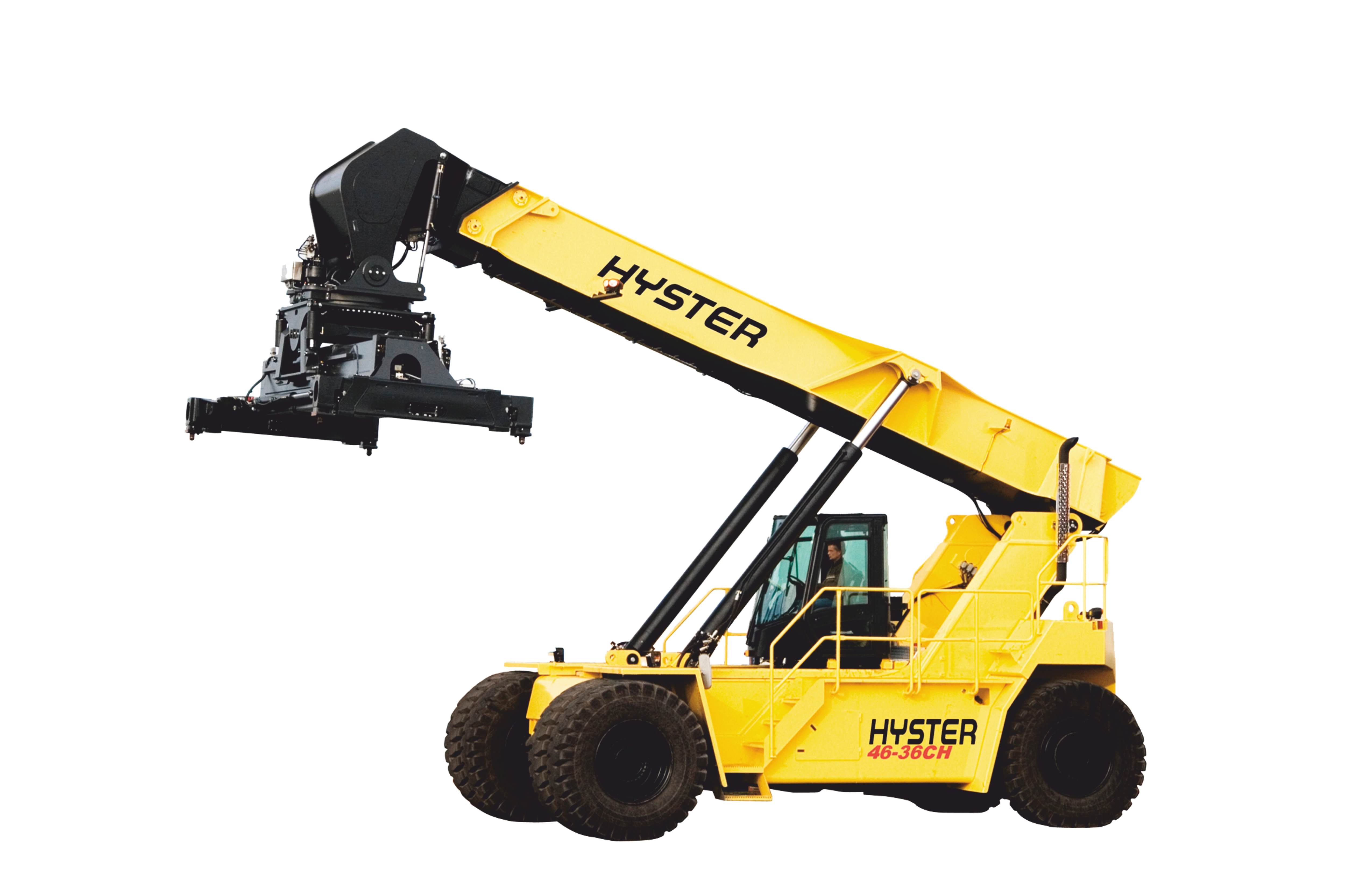 Ричстакер грузоподъемностью 45 тн